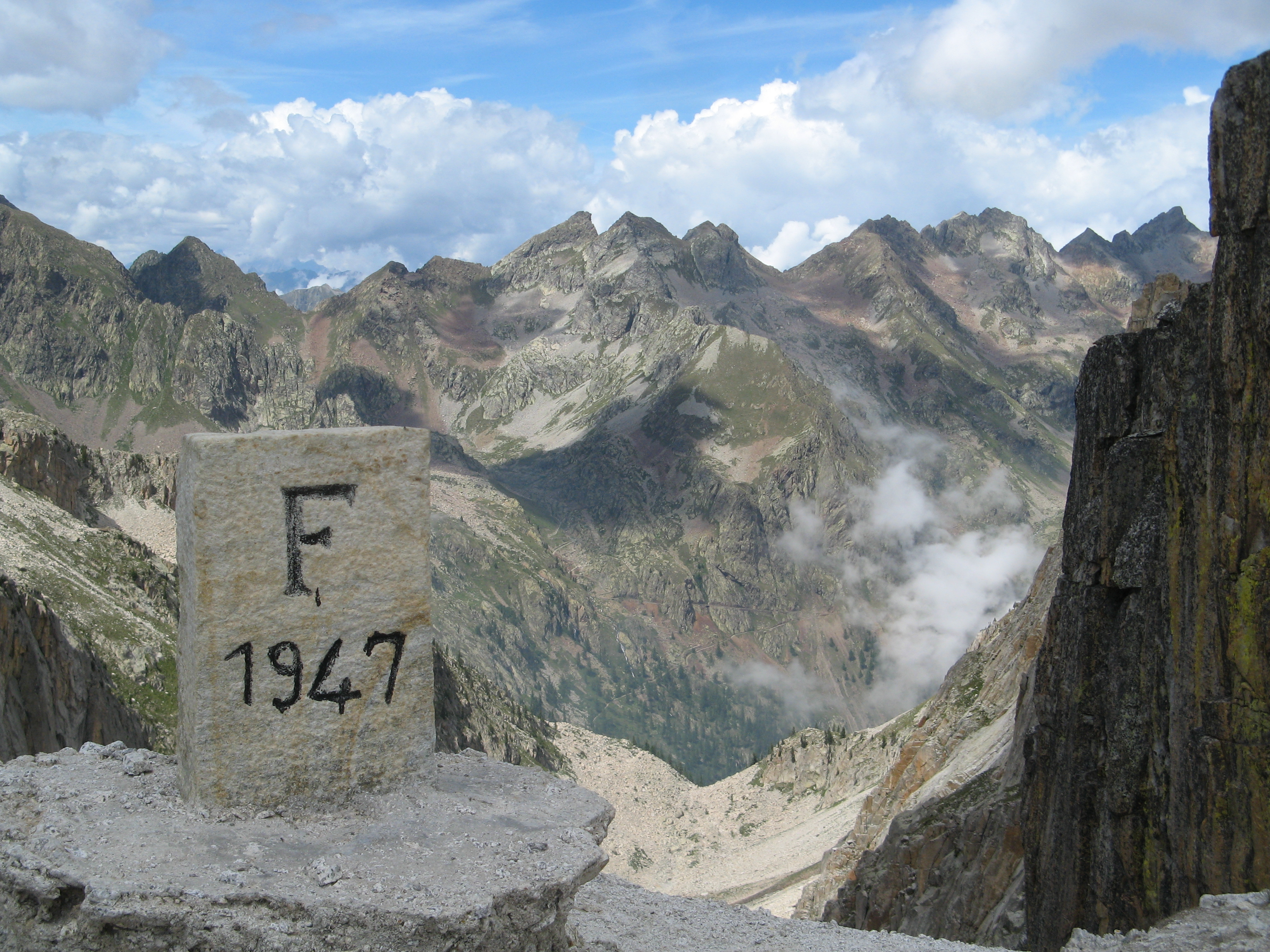 Vue sur le côté italien depuis le Pas de Préfouns (2615 m) et borne frontière française de 1947.